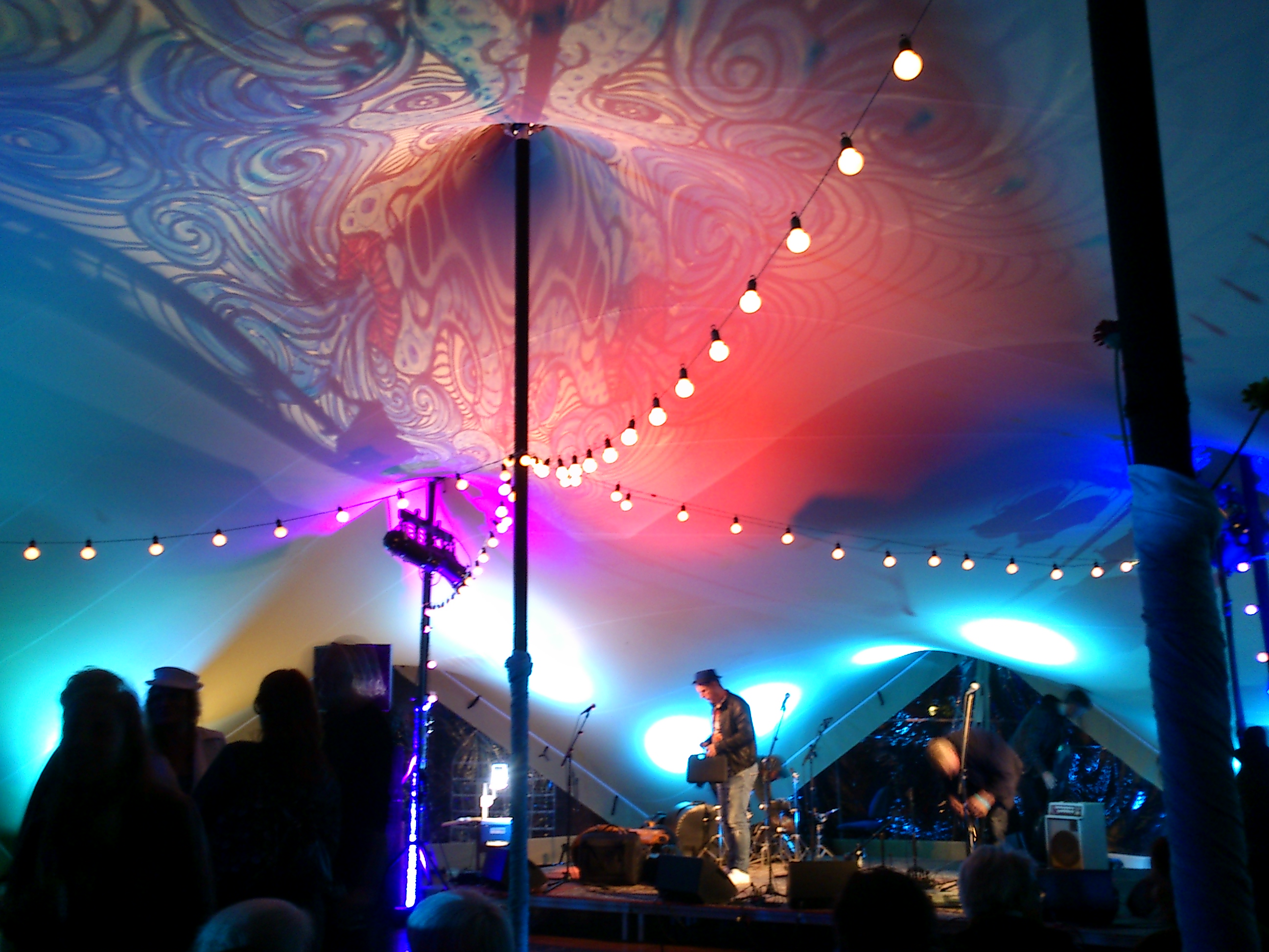 Det Tyrkise Telt. Aarhus Festuge 2016.